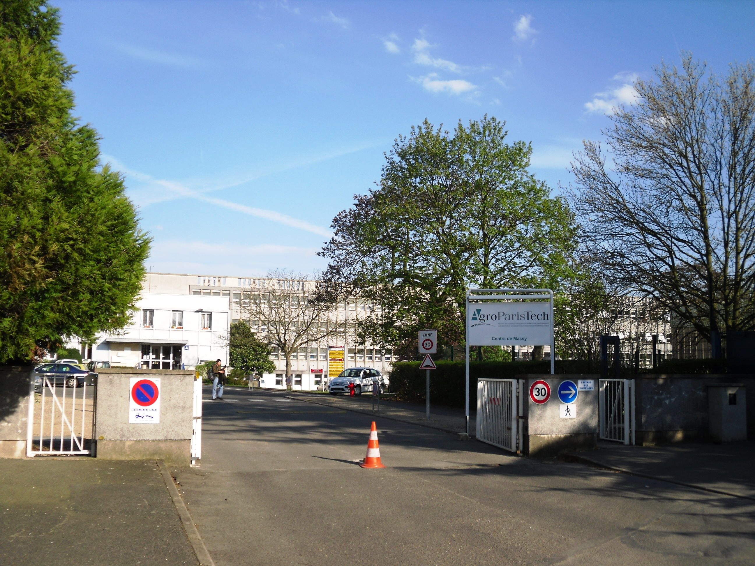 Le centre AgroParisTech de Massy (91)